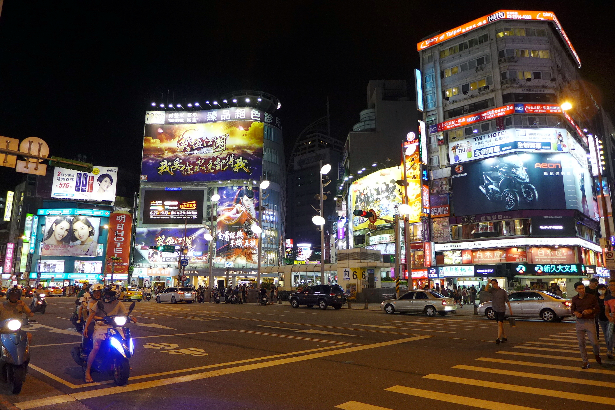 中文（台灣）: 中影新世界大樓前的夜景。